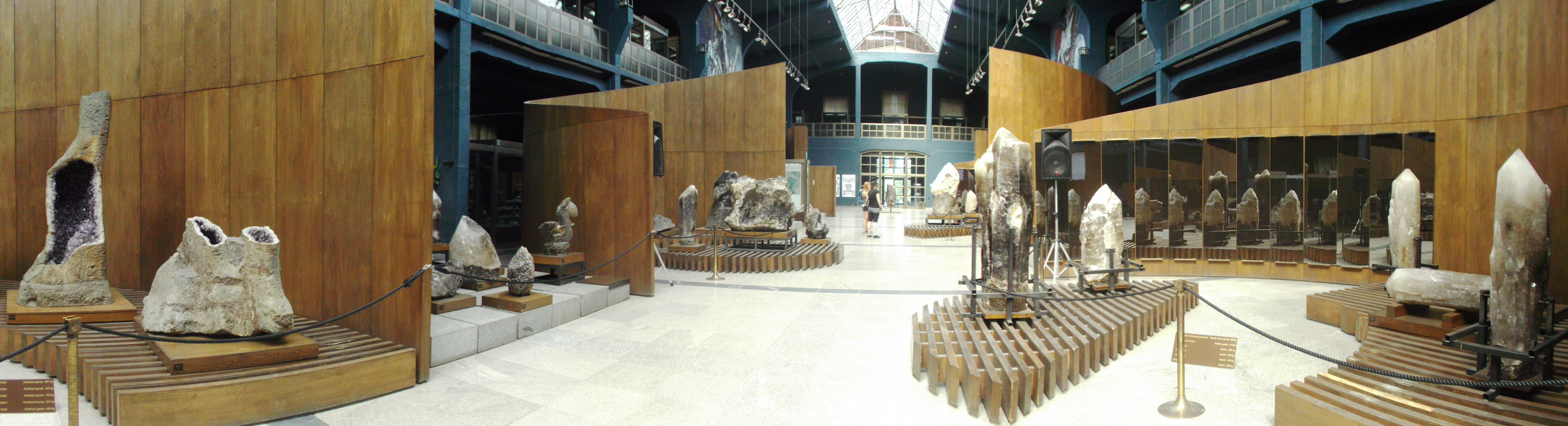 зала 22